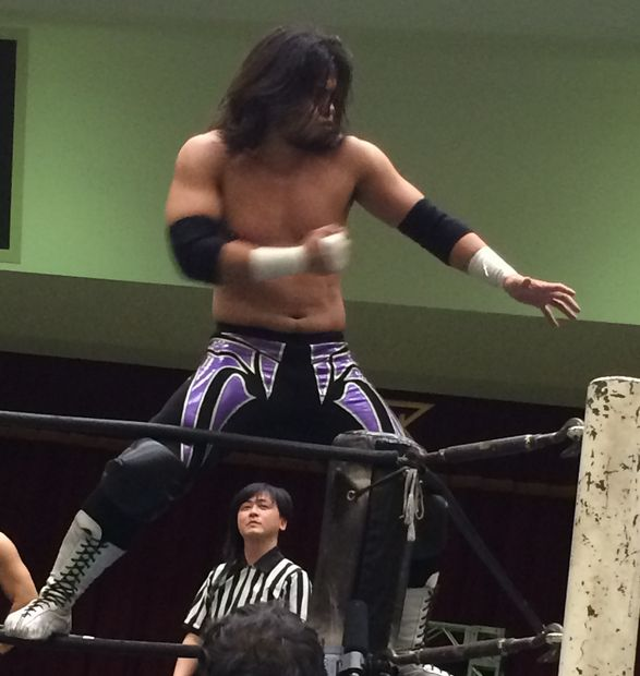 港区民ホール